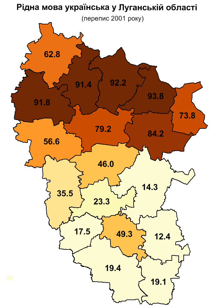 Рідна мова українська у Луганській області за переписом 2001 р./ Ukrainian as native language in Luhansk oblast, 2001 census